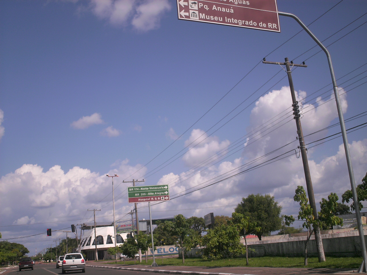 Boa Vista